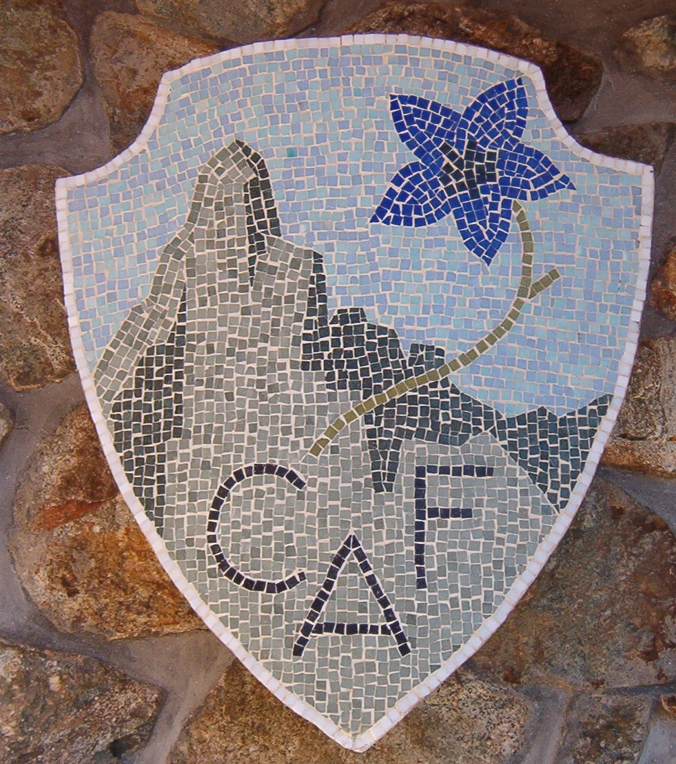 Stemma del Club Alpino Francese (CAF): presso il Rifugio del Pelvoux - Massiccio des Ecrins - France